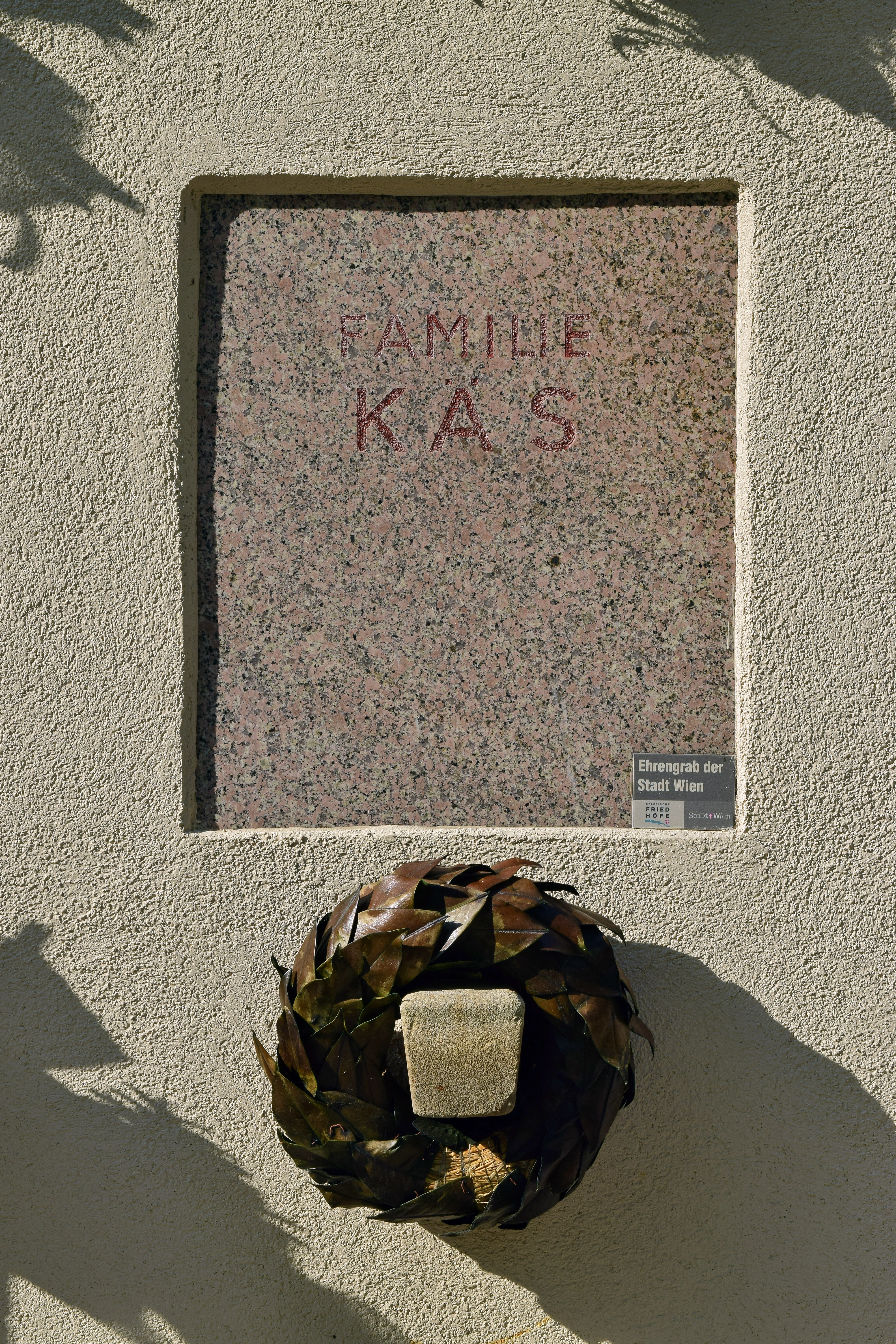 Ehrenhalber gewidmete Urnenstelle von Ferdinand Käs in den Arkaden der Feuerhalle Simmering, Nr. 368